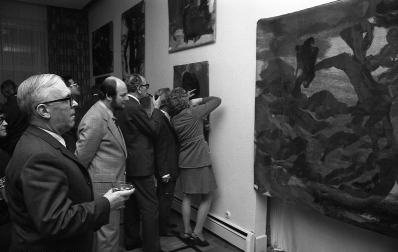 Eröffnung der Ausstellung "Motive aus Wolle" nach der Art-Protis-Kunst der tschechischen Künstlerin Zoia Schmitter-Kasprikova in der Landesvertretung Niedersachsen, Bonn